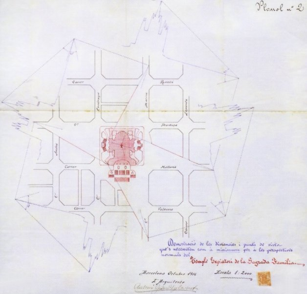 Proyecto de plaza urbana para la Sagrada Familia, de Antoni Gaudí (1916).